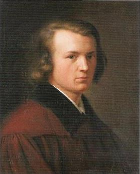 Self-portrait